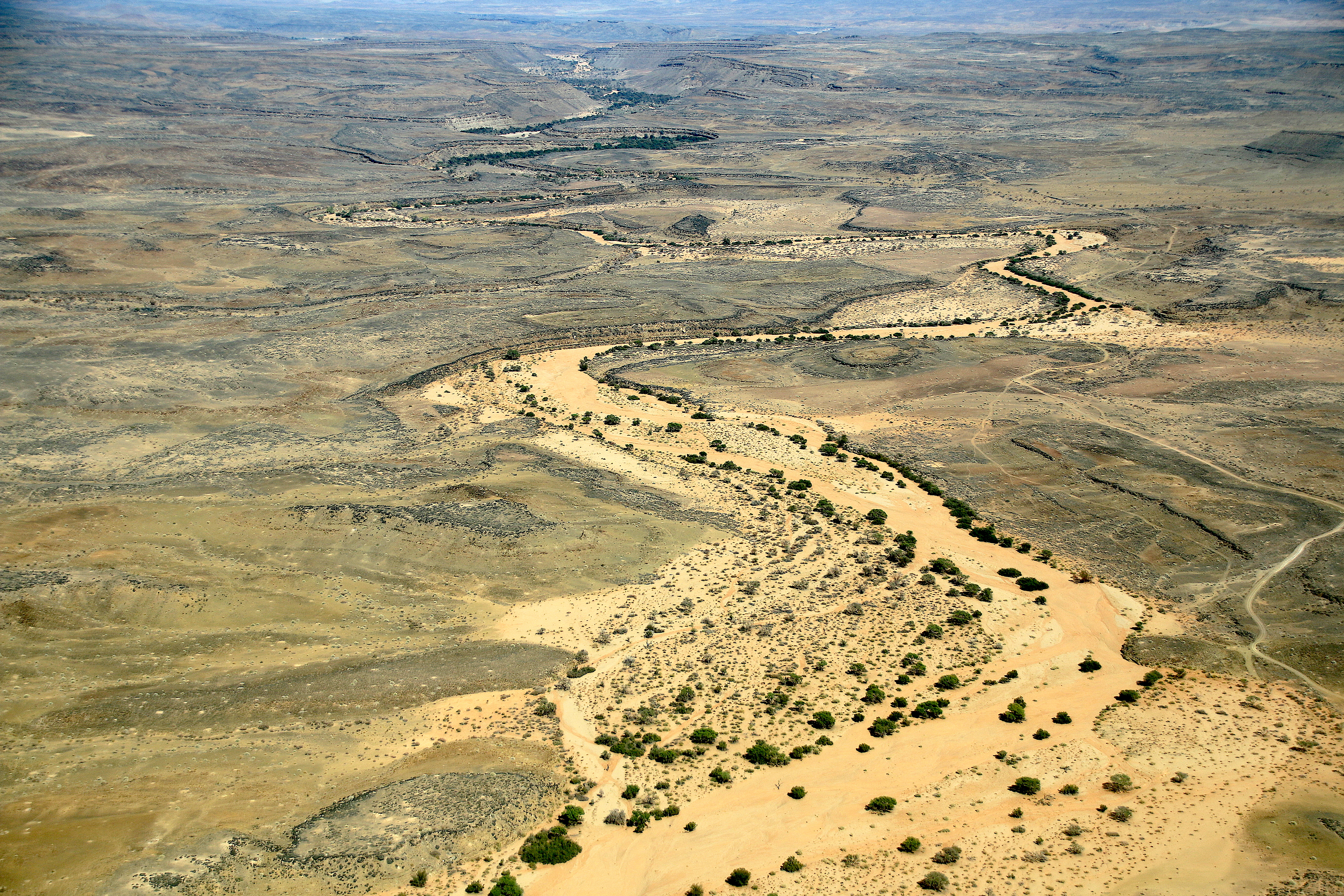 Gaab River